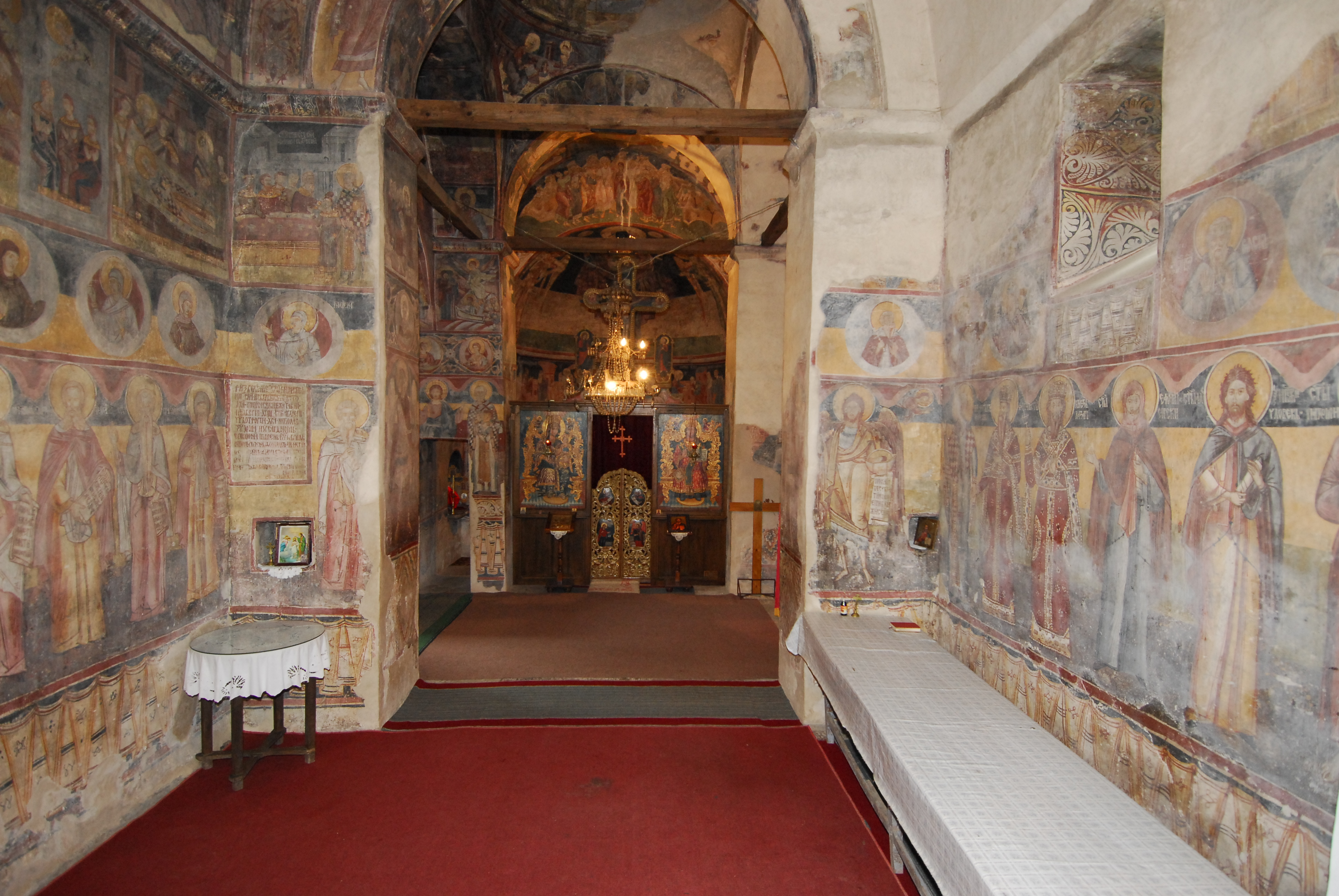 Унутрашњост цркве у манастиру Јежевица.